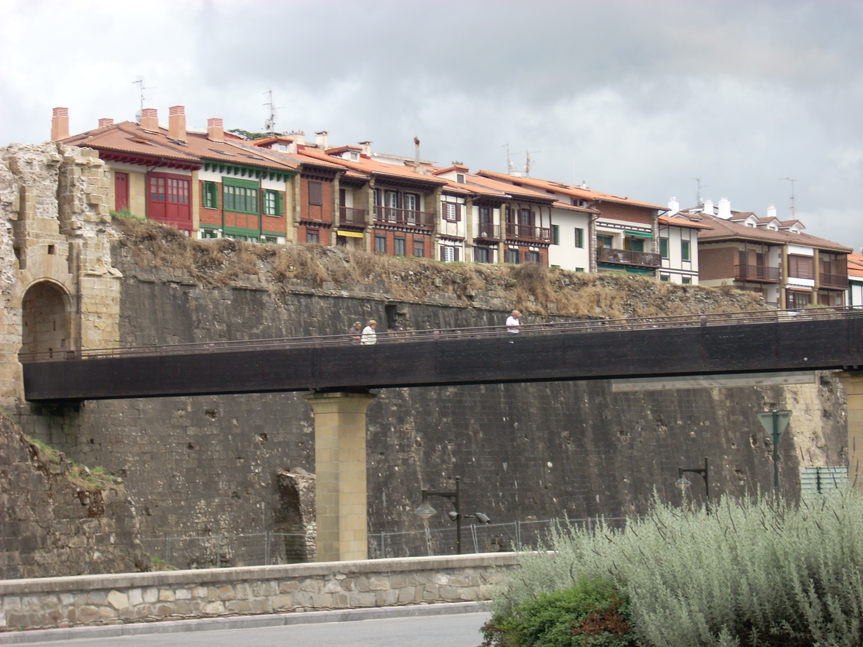 Mura e Porta San Nicola, Hondarribia, Guipúzcoa, Spagna